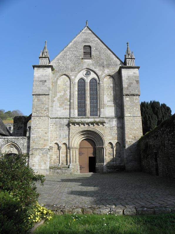 Façade principale de l'abbatiale Saint-Magloire de léhon (22).